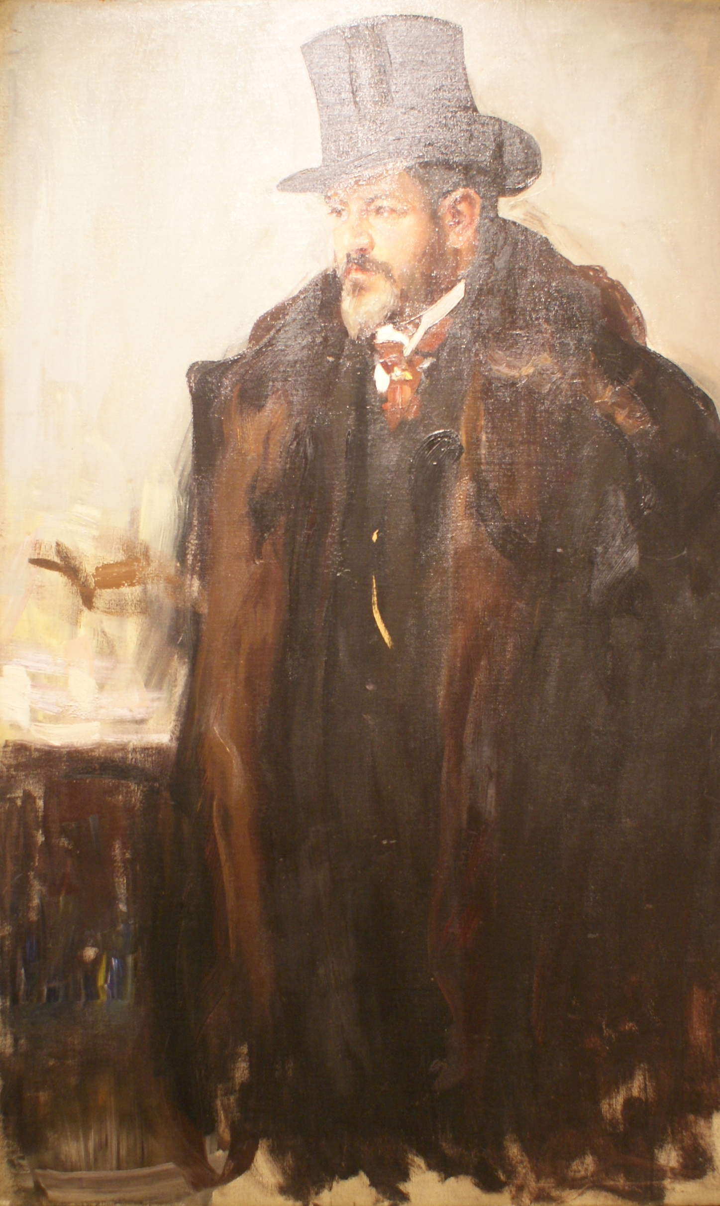 Партрэт Л. Н. Бенуа. Палатно, алей